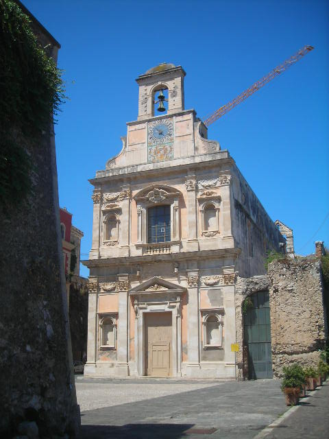 La facciata del Santuario della Santissima Annunziata in Gaeta (LT).